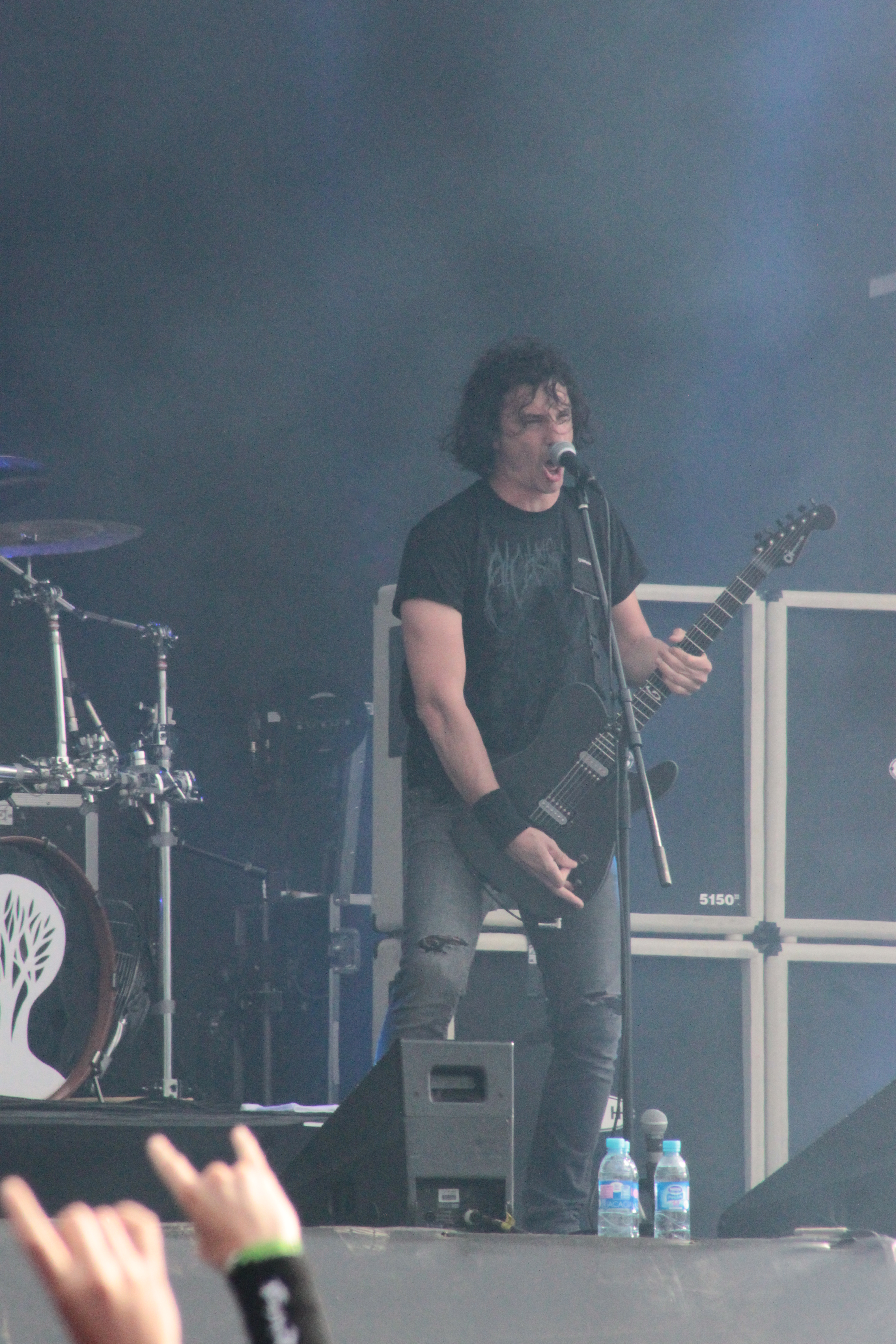 Joseph Duplantier, Gojira, Helfest 2013, Fr-44-Clisson.